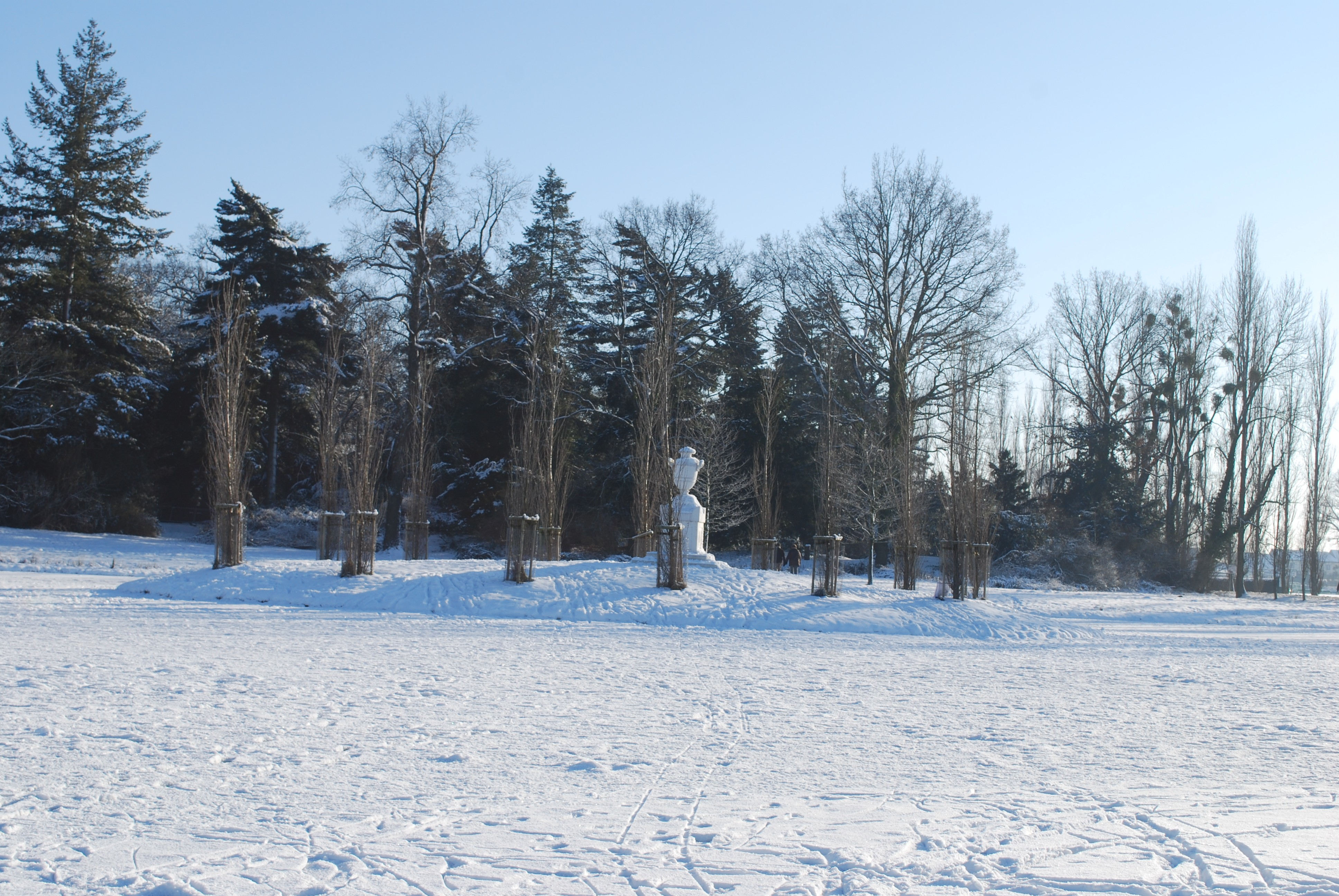 Rousseau-Insel im Wörlitzer Park im Winter